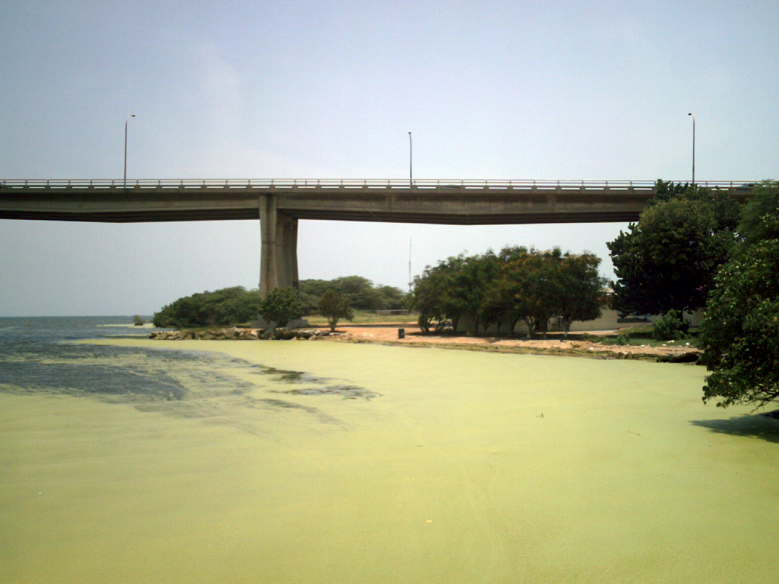 Parque Visita tu puente a las cercanías del puente sobre el lago de Maracaibo, Venezuela.